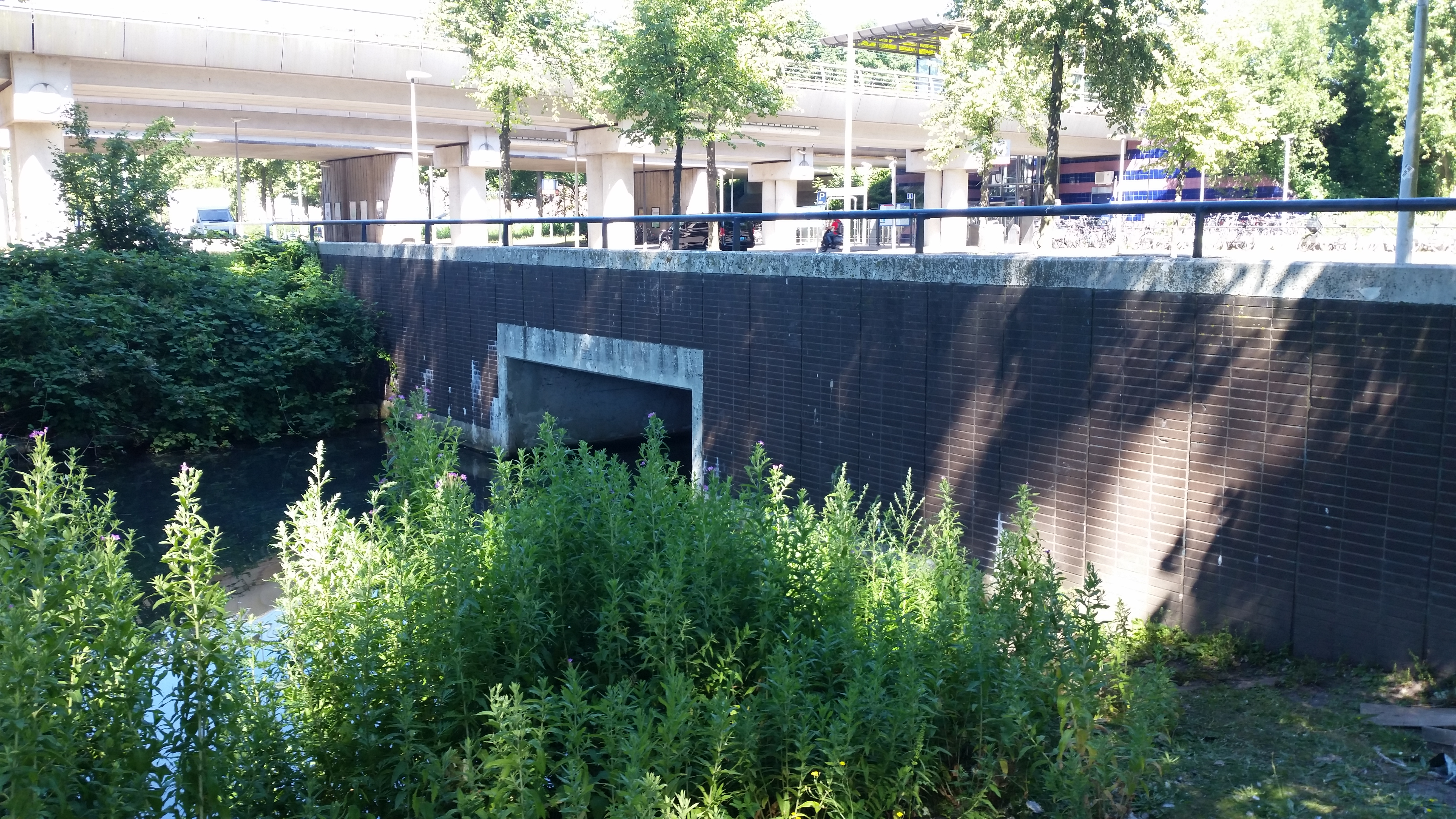 Brug 656, Charley Tooropbrug, overspanning van duiker